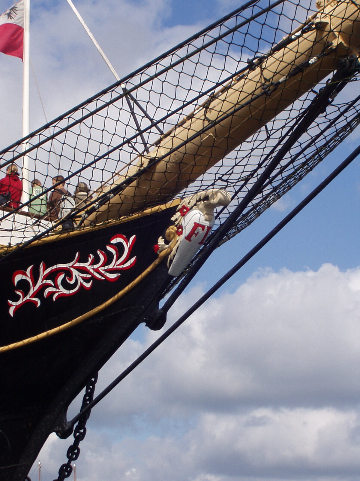 Bug der Viermastbark Passat im Hafen von Travemünde